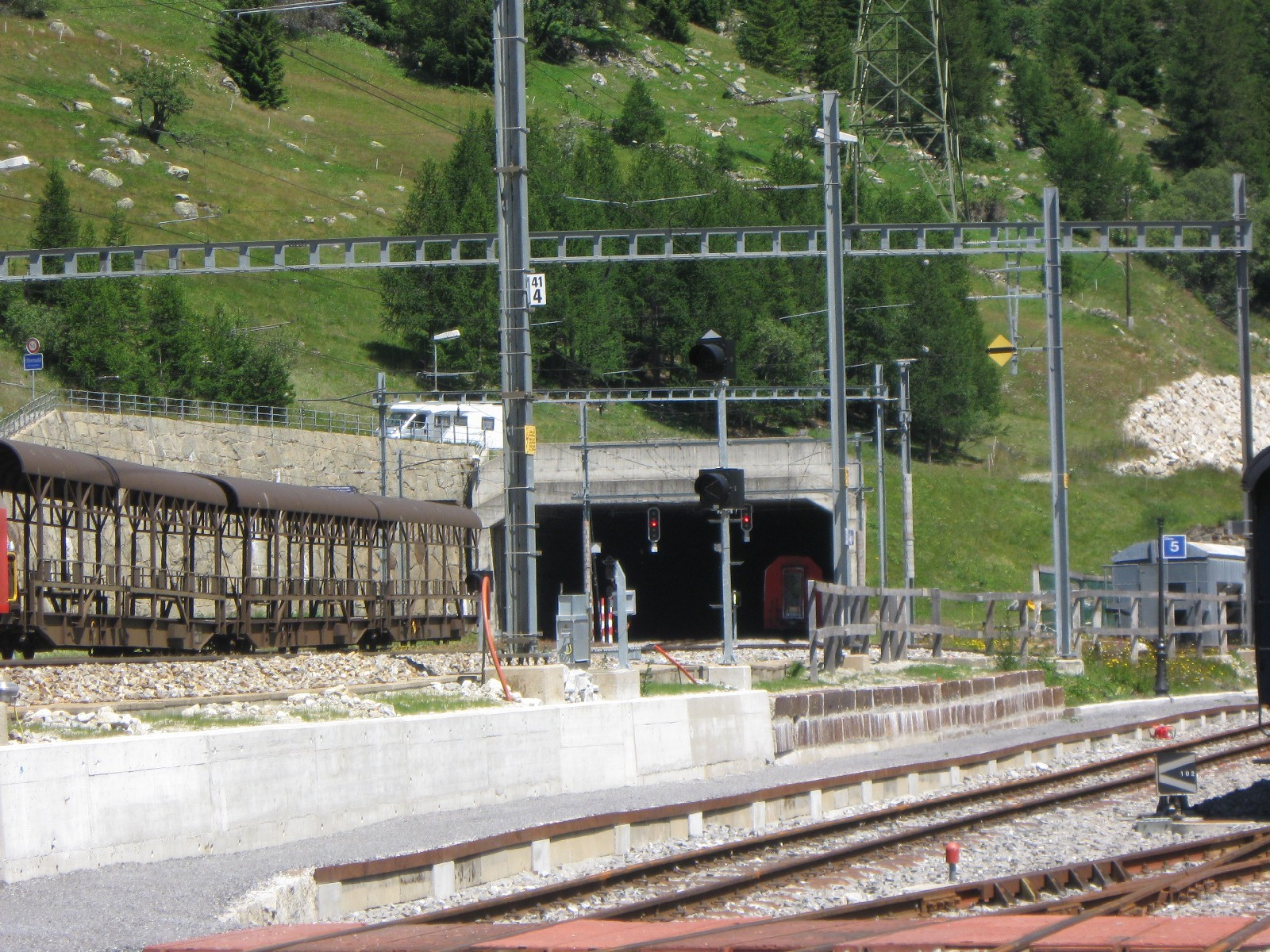 Westliches Portal des Umgehungstunnels in Oberwald (Länge 673 m) Western portal of the Oberwald By-Pass Tunnel (Length 673 m)